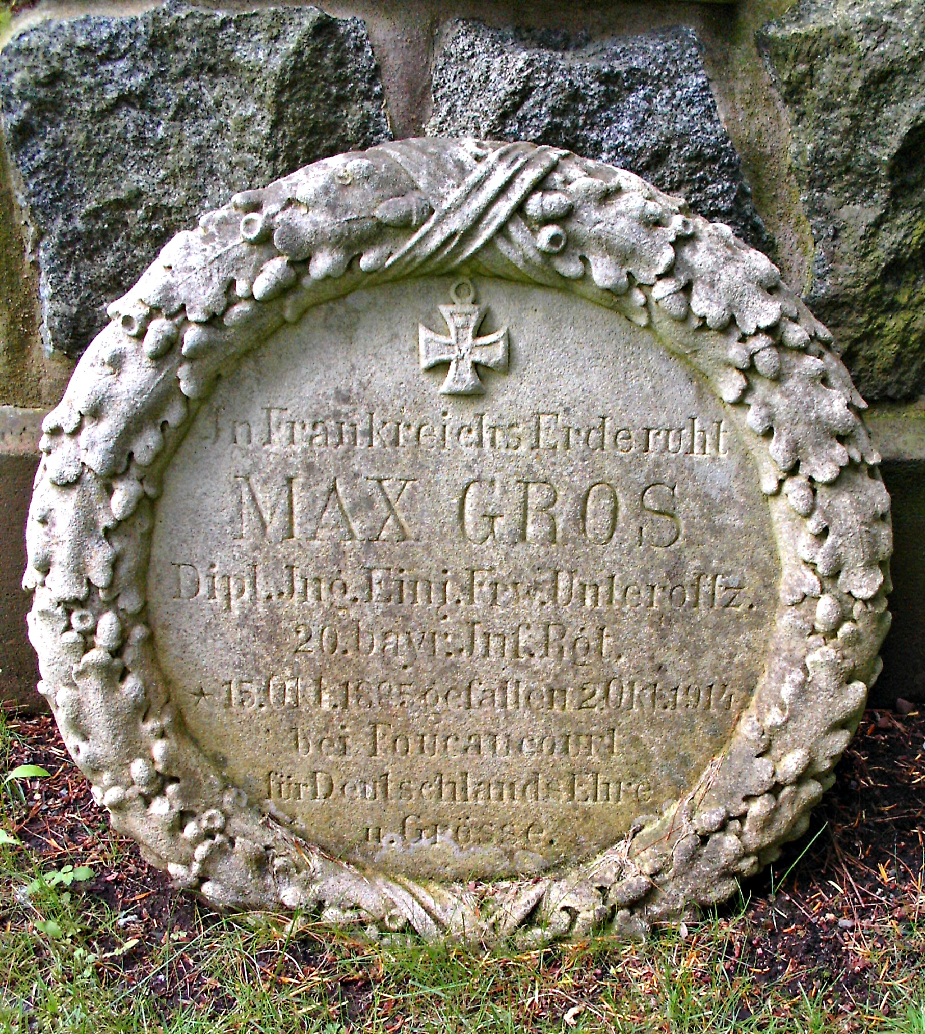 Gedenkstein, Gefallener des 20. Bay. Inf. Rgt`s auf dem Hauptfriedhof Kaiserslautern (1914).